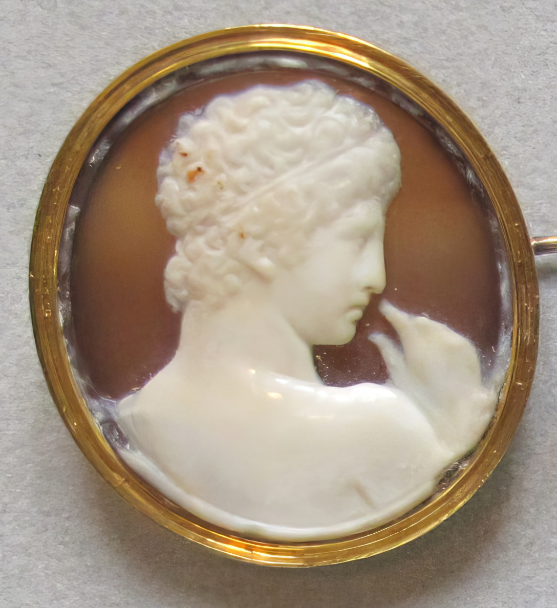 Arte ellenistica (alessandria), ritratto di principe tolemaico, in onice, II sec. ac